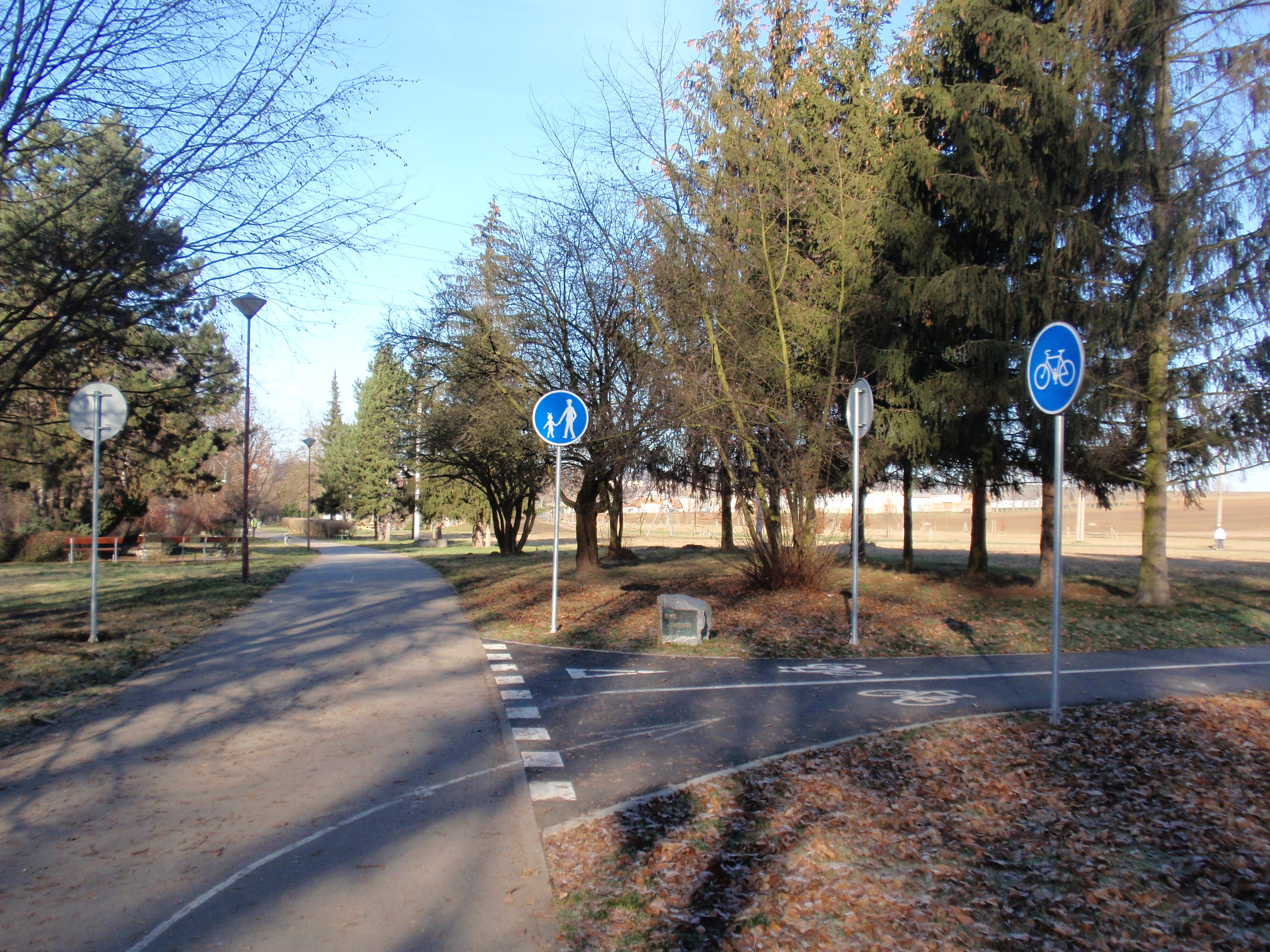 Dědický park, křižovatka, dopravní značky